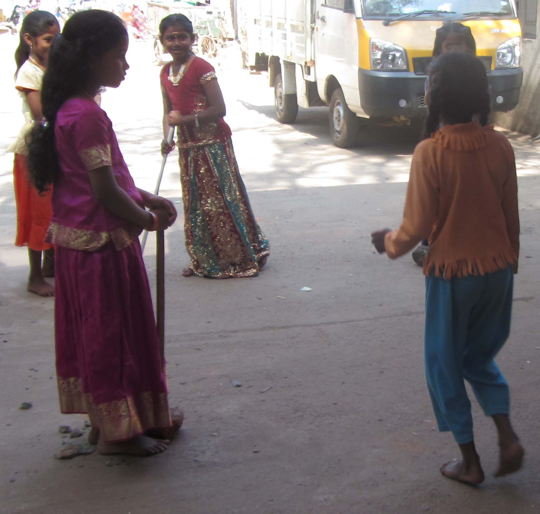 ஓடித்தொடு விளையாட்டு 'கல்லில் கம்பு ஊன்றி நின்றால் தொடக்கூடாது.